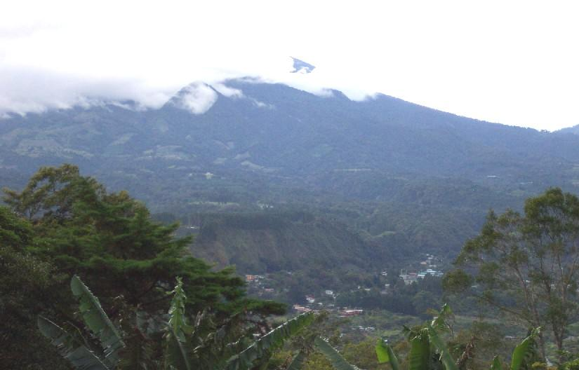 Volcán Barú